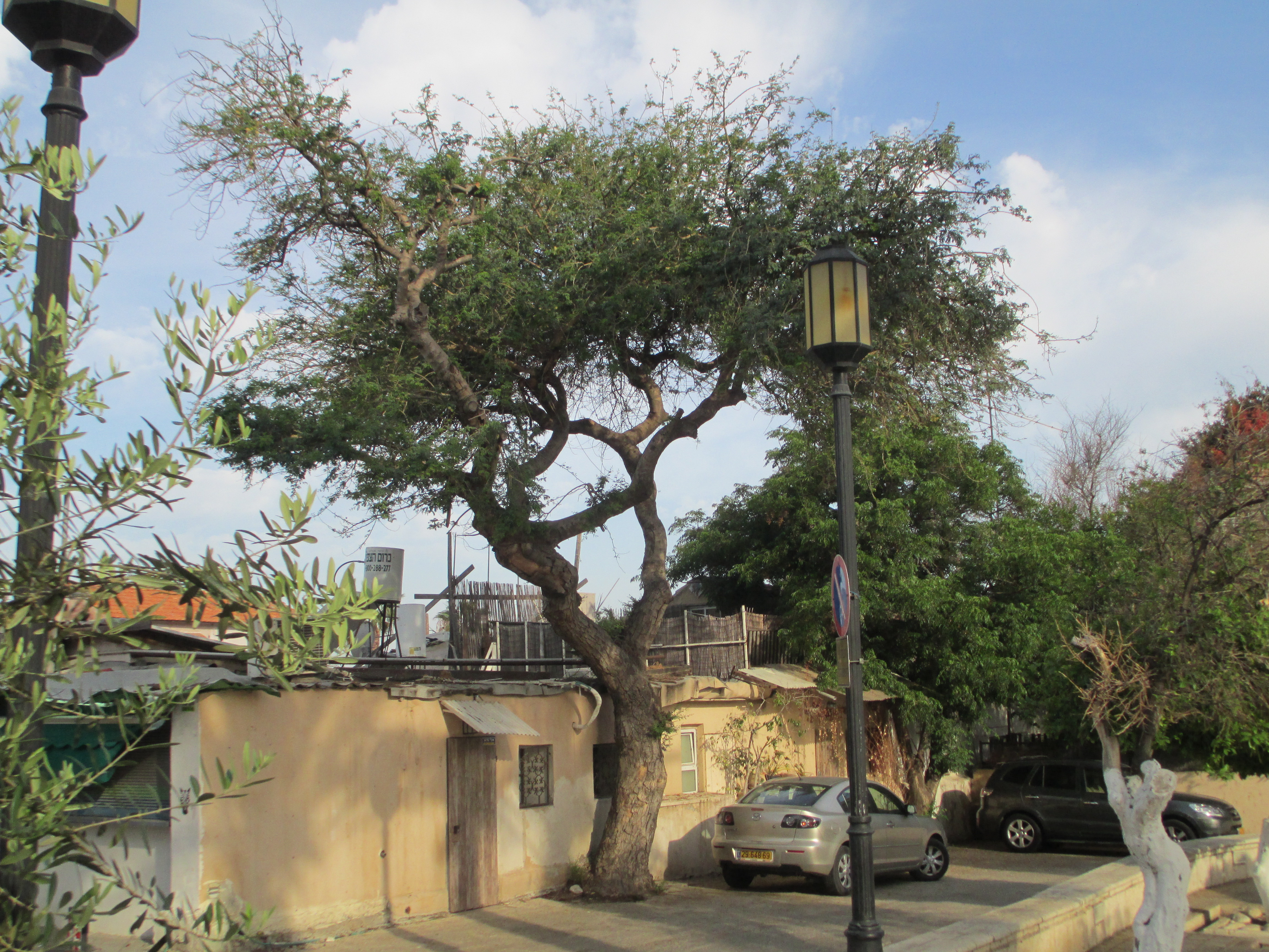 עץ יחיד של שיטה מלבינה במרכז סוזן דלל בתל אביב